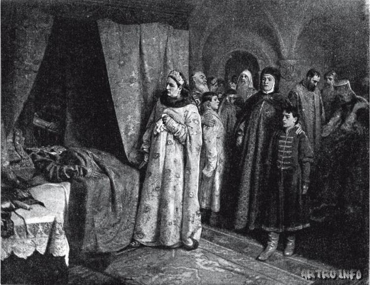 Кончина царя Федора Алексеевича.